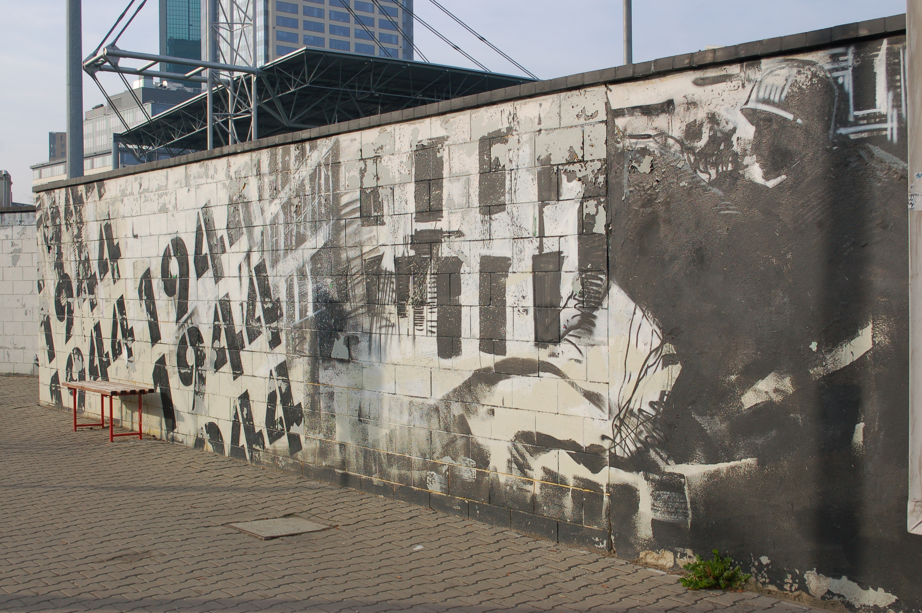 Polonia